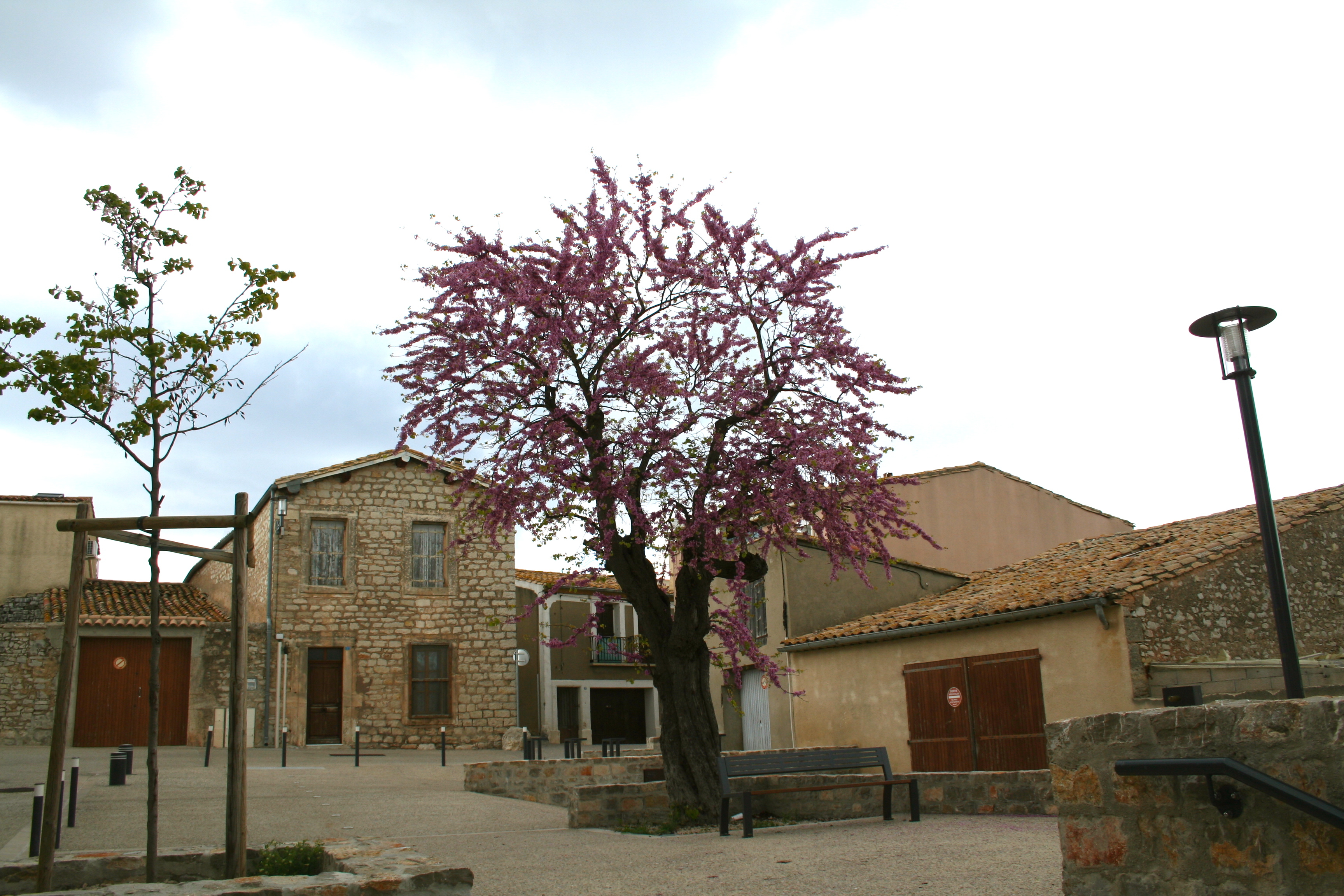 Cournonsec (Hérault) - place.